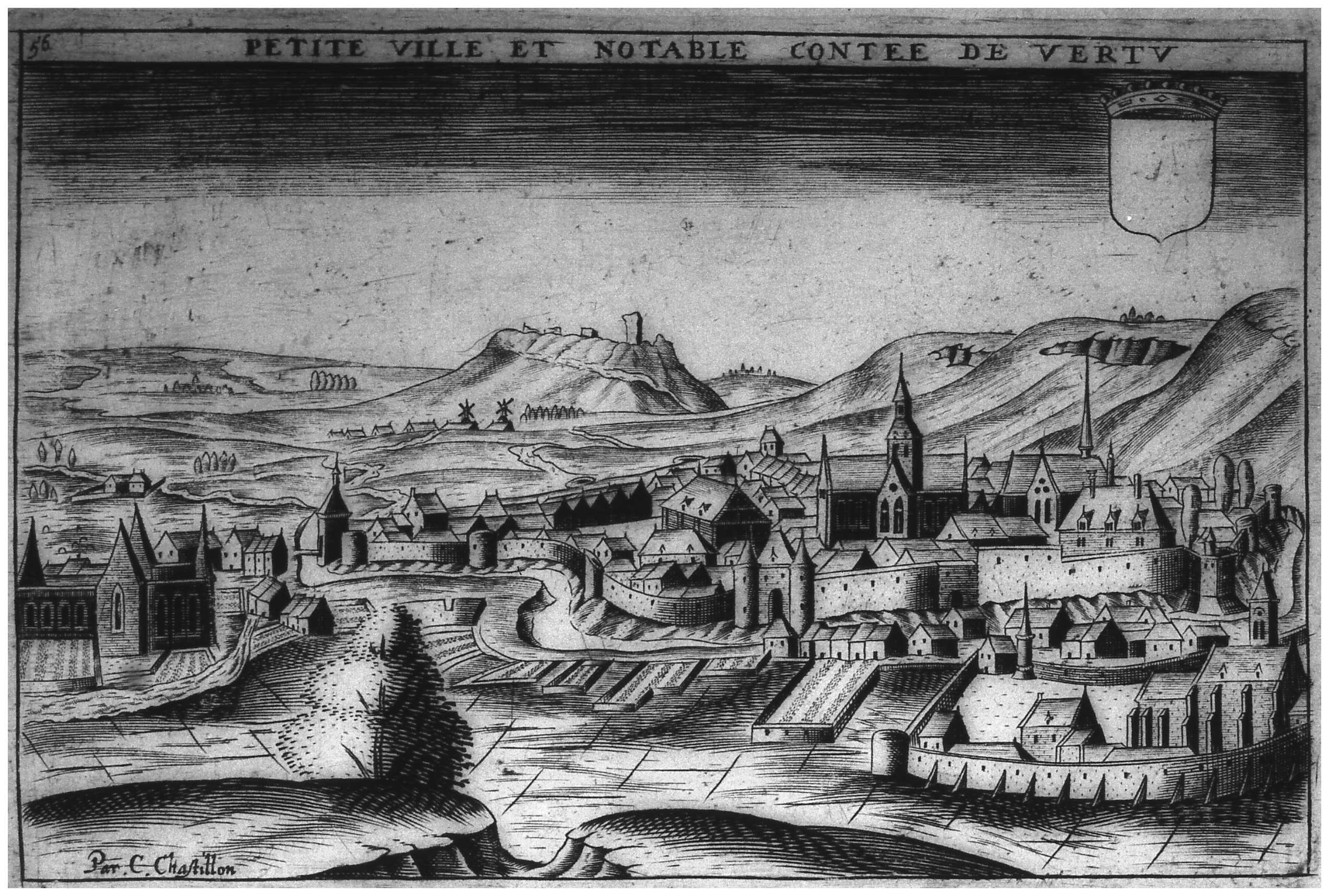 dessin d'époque